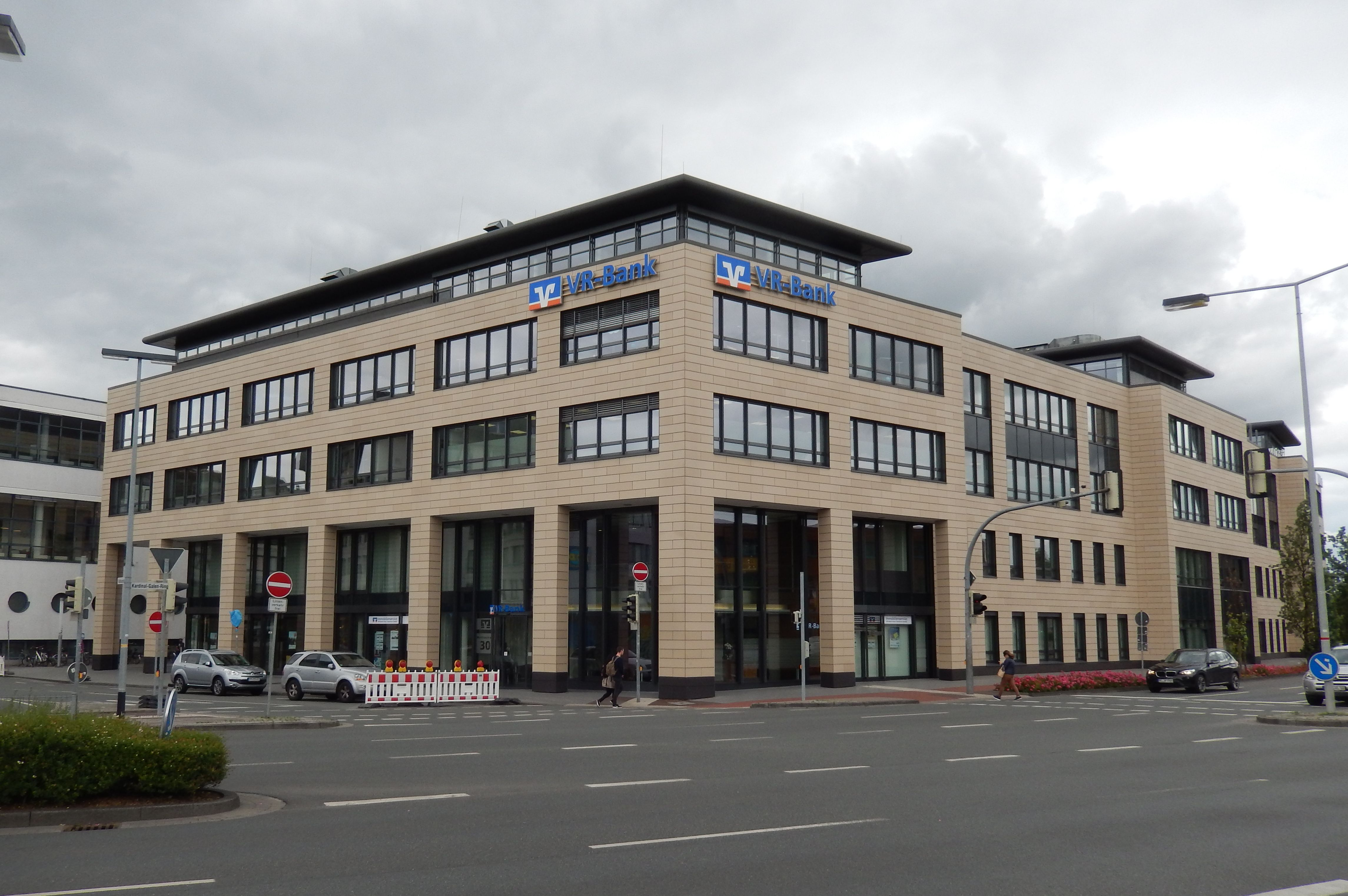 VR-Bank in Rheine, Juni 2017